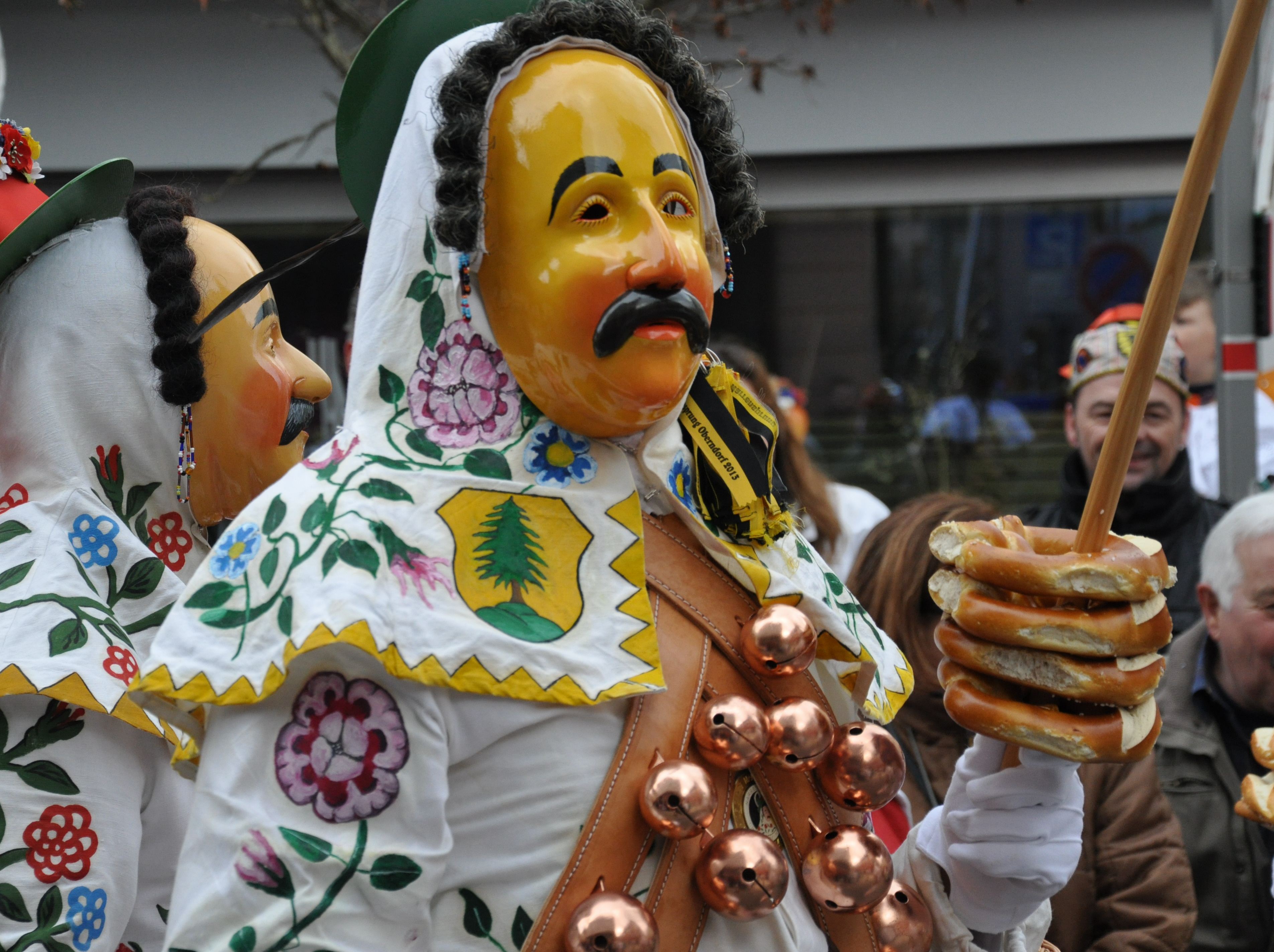 Oberndorf am Neckar, Narrensprung am Fasnetsdienstag nachmittag 2014, Narro